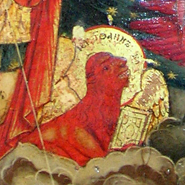 Ікона з Веткаўскага музея